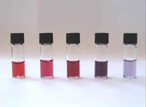 קולואיד זהב בגדלים שונים